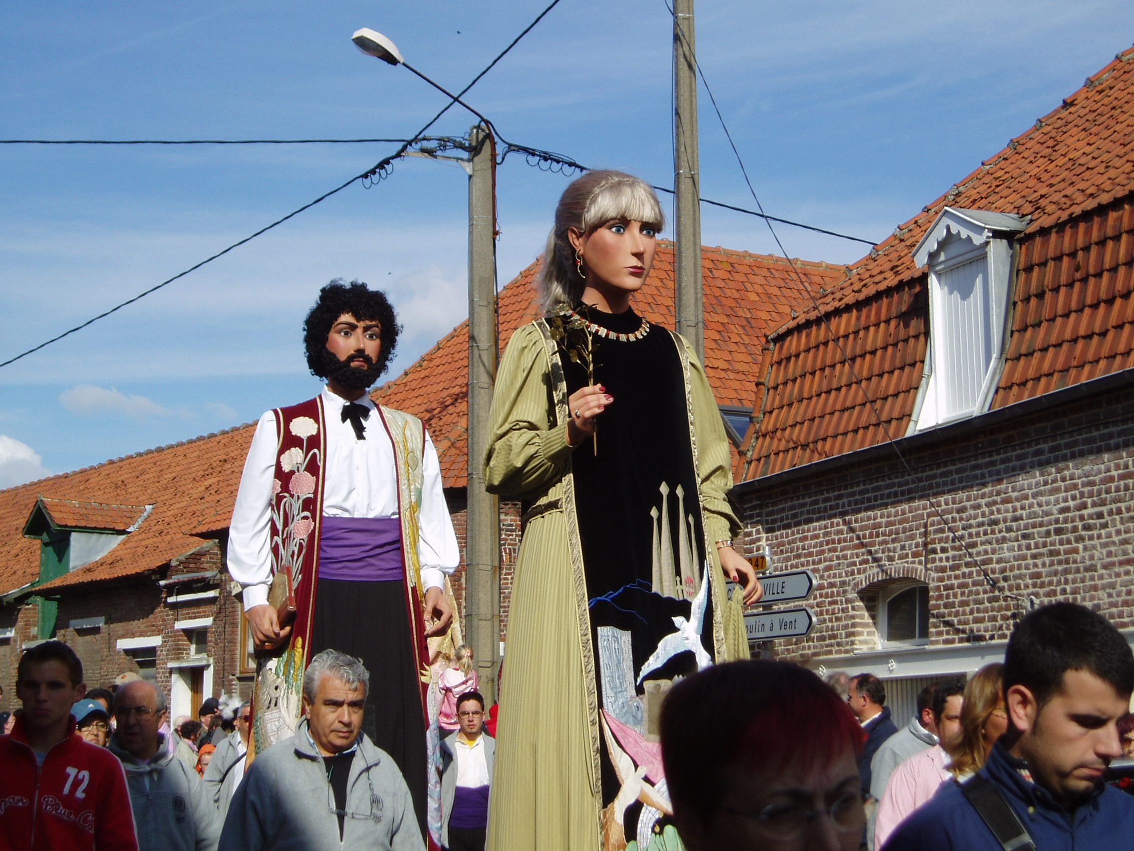 Ronde européenne de géants portés - Steenvoorde 2006